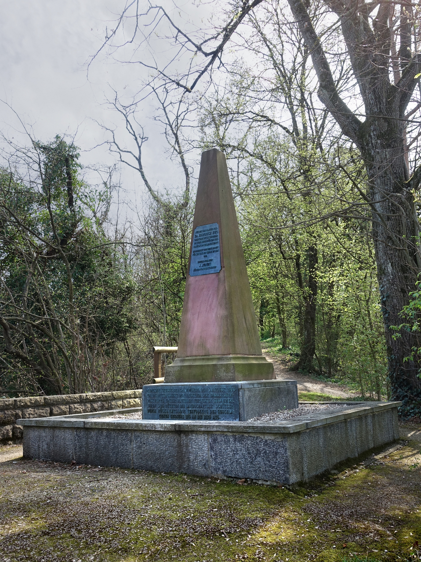 Hülftendenkmal Inschrift: Auf diesem Platze fiel Dr. Heinrich Hug Obergerichtsschreiber. Im Tode Ehrenbürger des Kantons Basellandschaft. Die Freiheit war seine Braut für sie ging er gerne in den Tod. Weiter viel hier. Am Hülftendenkmal Denkmal Sockel ist folgende Inschrift zu sehen. An dieser Stelle brach Samstag den 3. August 1833 um die Mittagszeit der Ansturm der Basler Standestruppe unter blutigen Verlusten zusammen. Jhren Sieg nützen die Landschäftler Schützen durch rücksichtsloses Verfolgen des geschlagenen Gegners bis an die Birs aus.